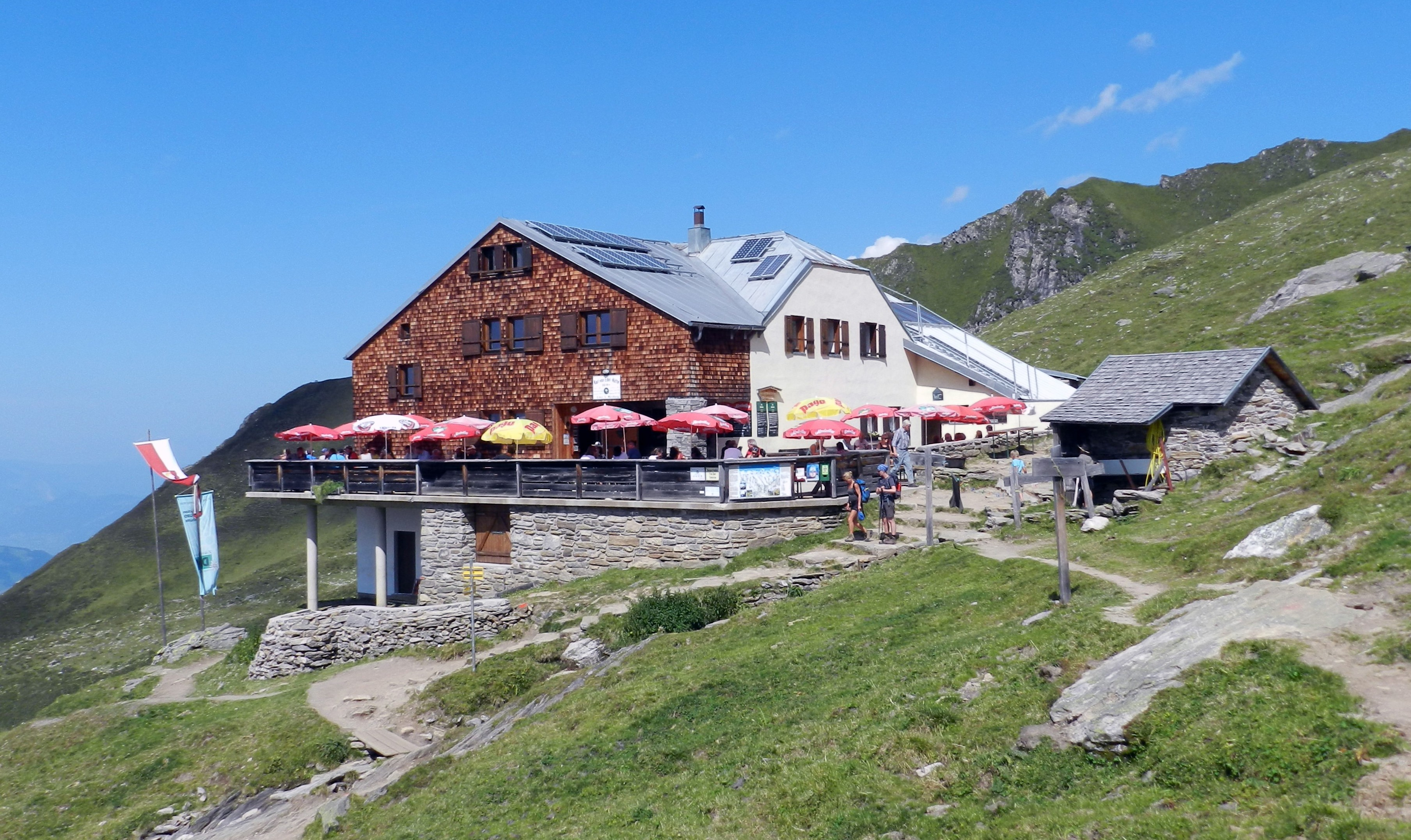 Karl-von-Edel-Hütte (meist Edelhütte genannt) in den Zillertaler Alpen (Tirol, Österreich)